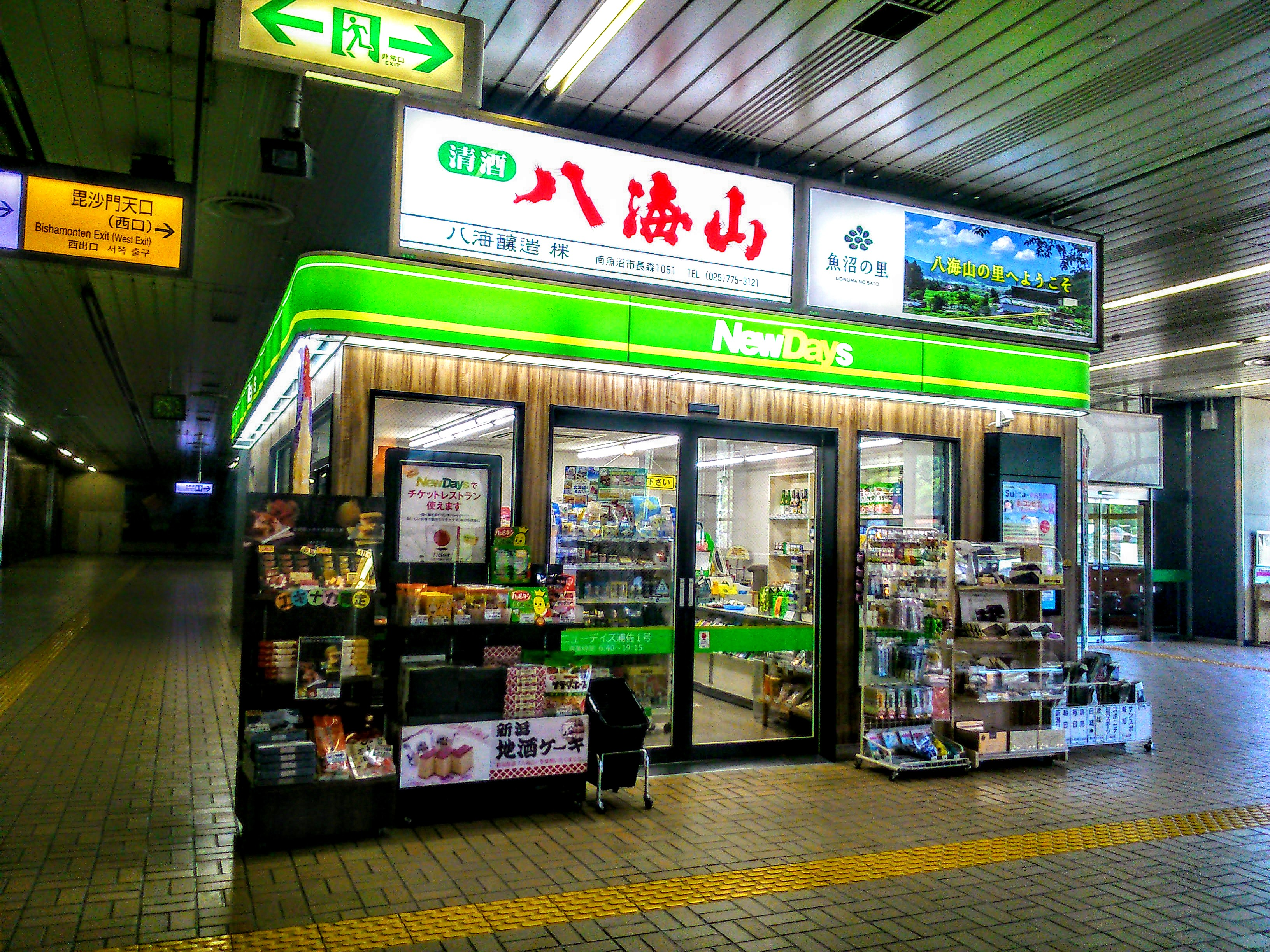 浦佐駅で営業するNewDaysを撮影しました。